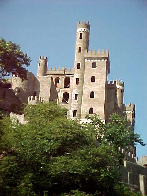 Tacoa en el estado Vargas - Venezuela a un año de del deslave de diciembre de 1999 (2000)